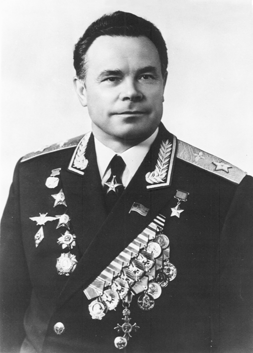 Павел Степанович Кутахов (1914 — 1984) — советский военачальник, Главный маршал авиации